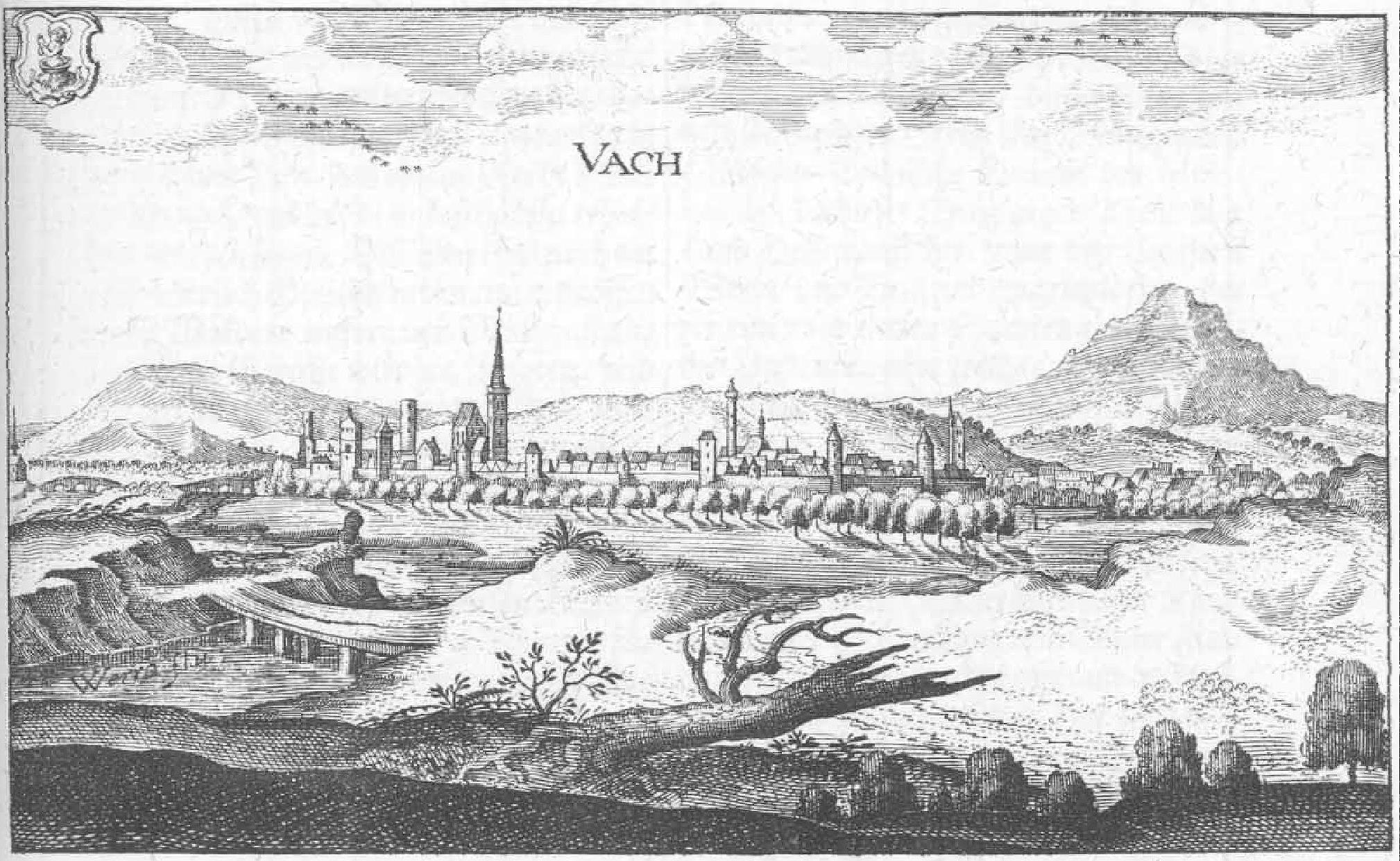 Vacha im Jahr 1655. Ganz links ist die alte Werrabrücke zu erkennen. Der Berg rechts im Bild ist der Öchsen (627,2 m ü. NN)